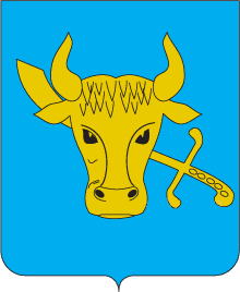 Герб Прилук